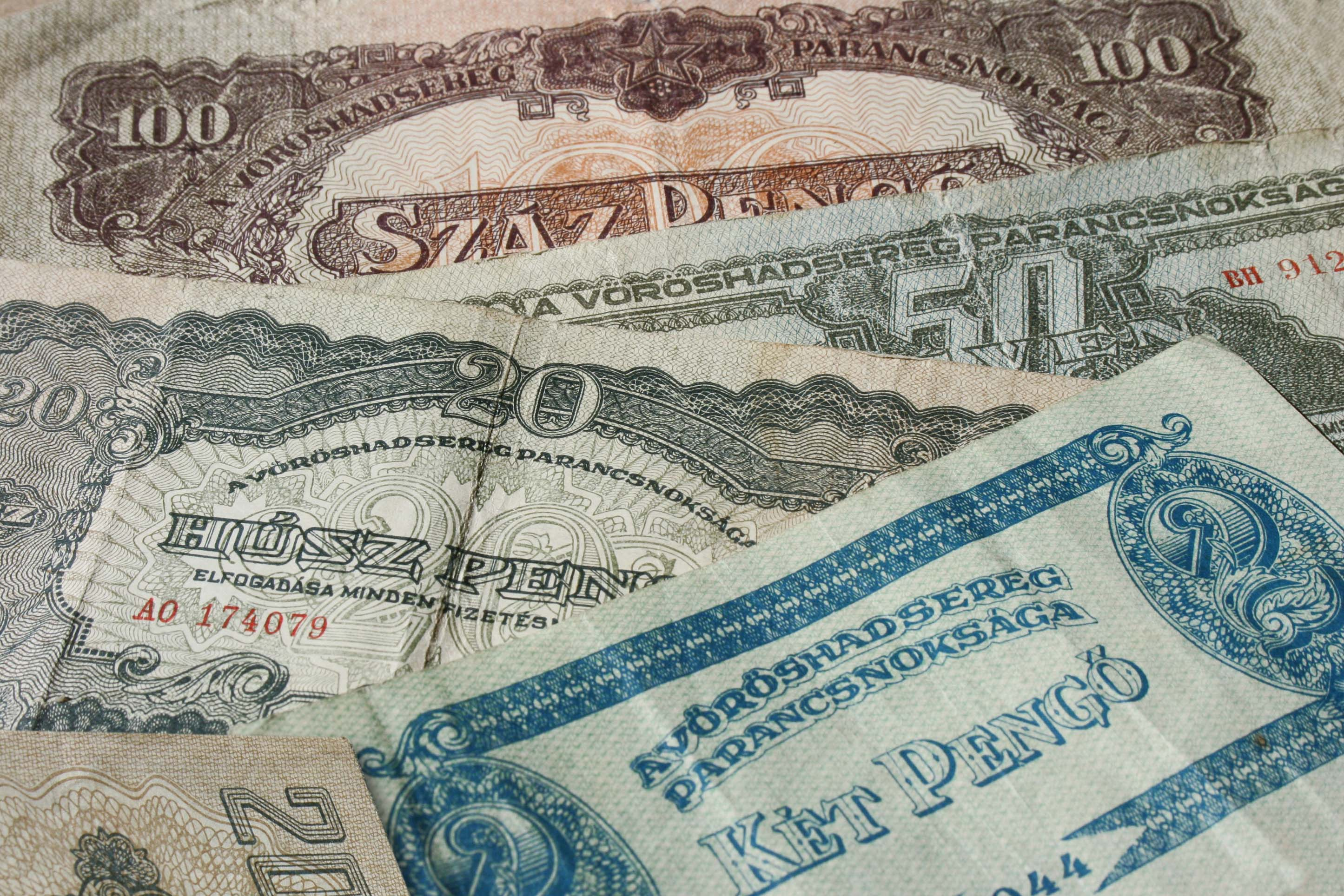 A Vörös Hadsereg Magyarország megszállásakor létrehozott fizetőeszköze, 1944-ben